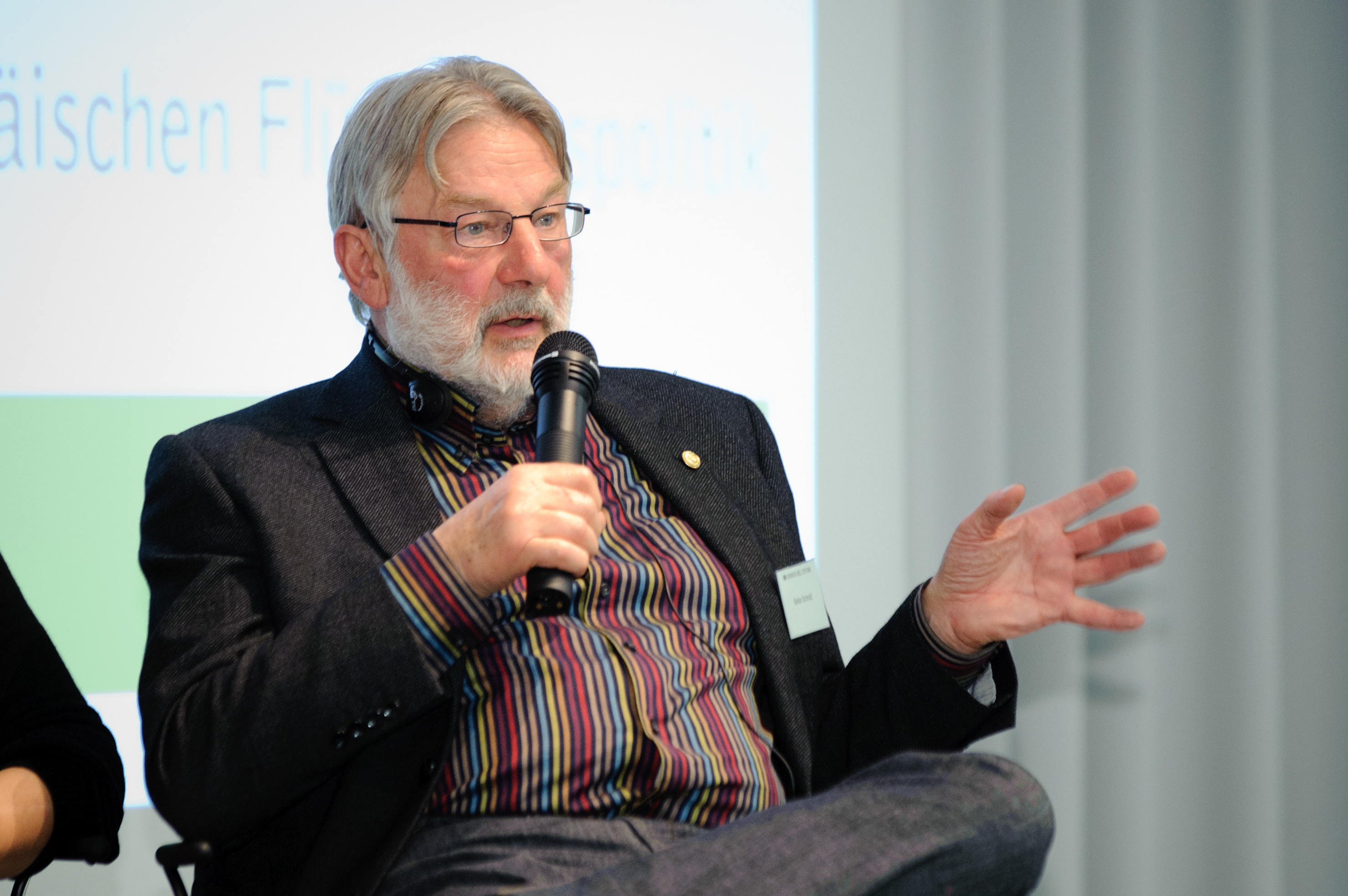 Stefan Schmidt, Schiffskapitän, ehem. Cap Anamour